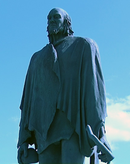 Estatua representativa de Bencomo en la Plaza de la Basílica de N.S. de Candelaria